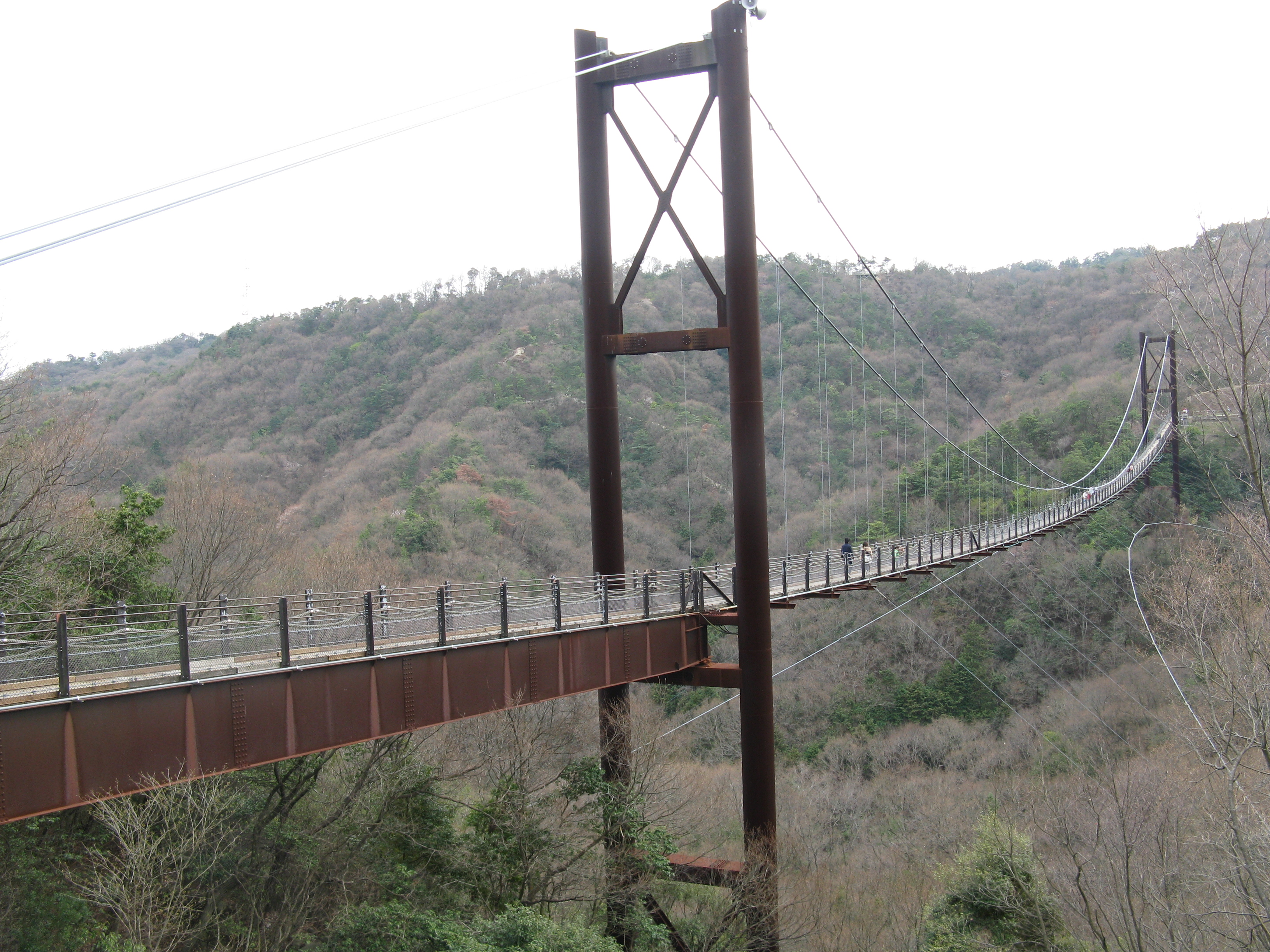 ほしだ園地の星のブランコ